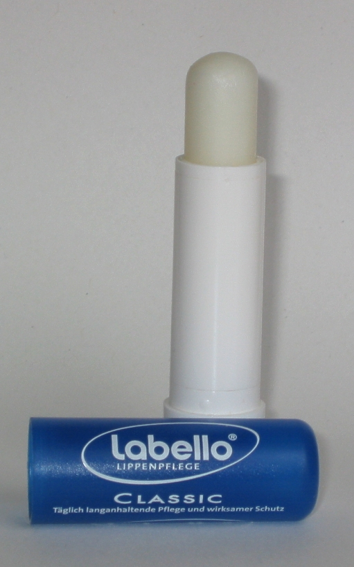 Bildbeschreibung: geöffneter Labello-Pflegestift Quelle: selbst fotografiert Fotograf: Zellreder Datum: Oktober 2005